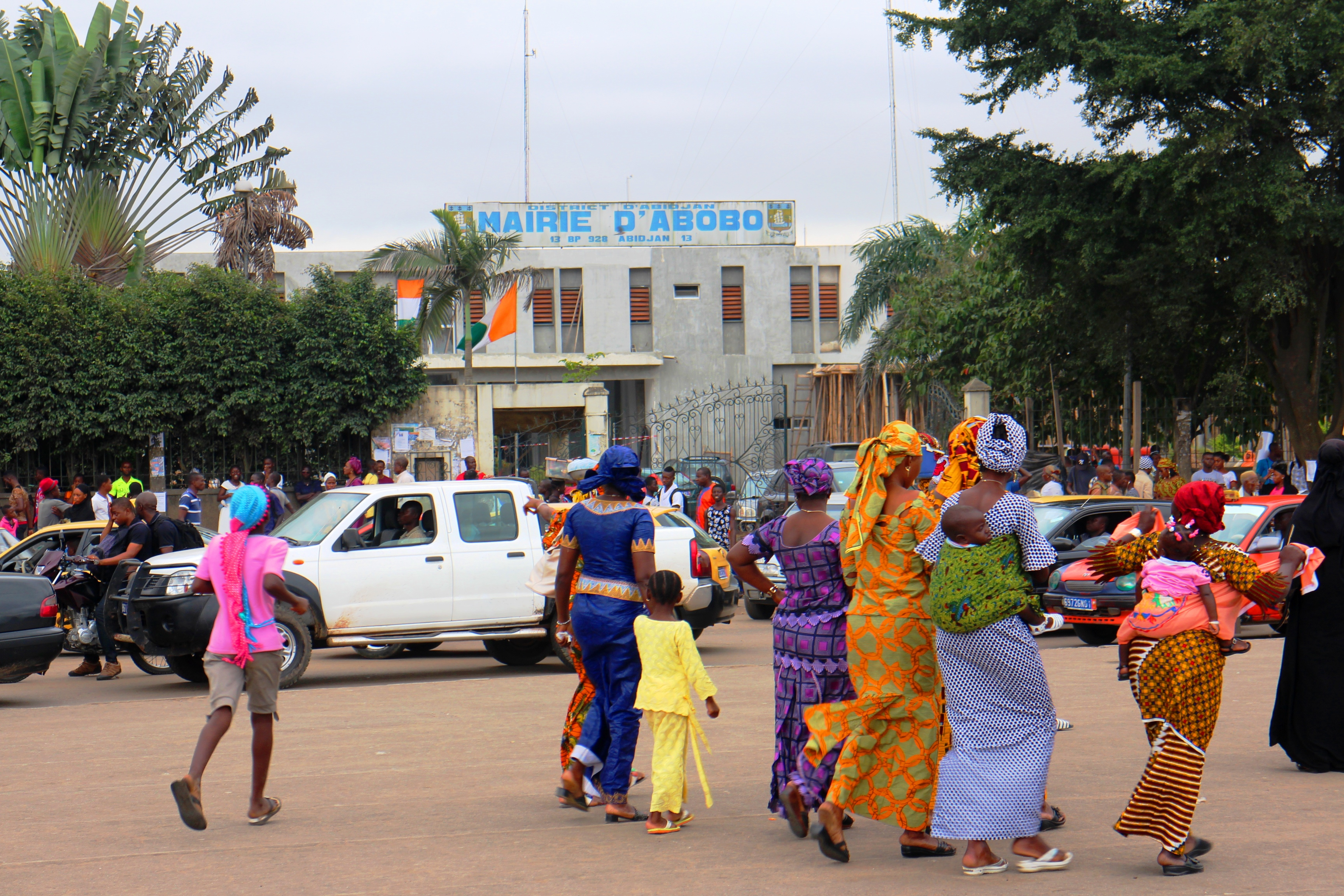 vue de la mairie d'abobo, entrée dans la cité